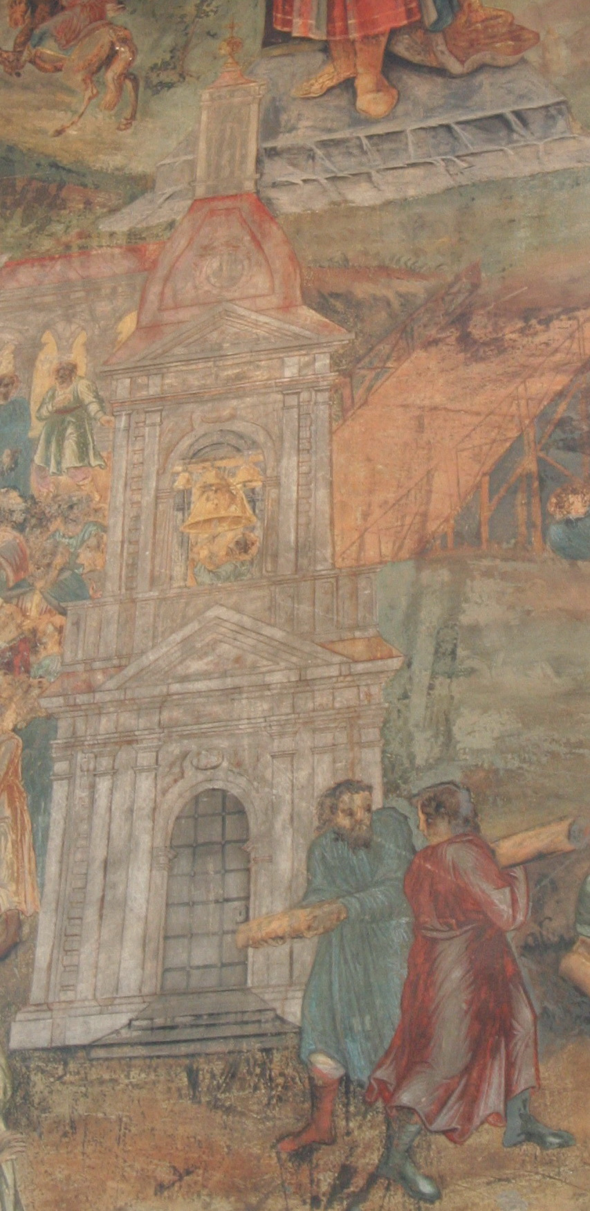 Пономарь бьёт в колокол. Битяговские пытаются выбить дверь в колокольне. Фрагмент житийной фрески царевича Дмитрия